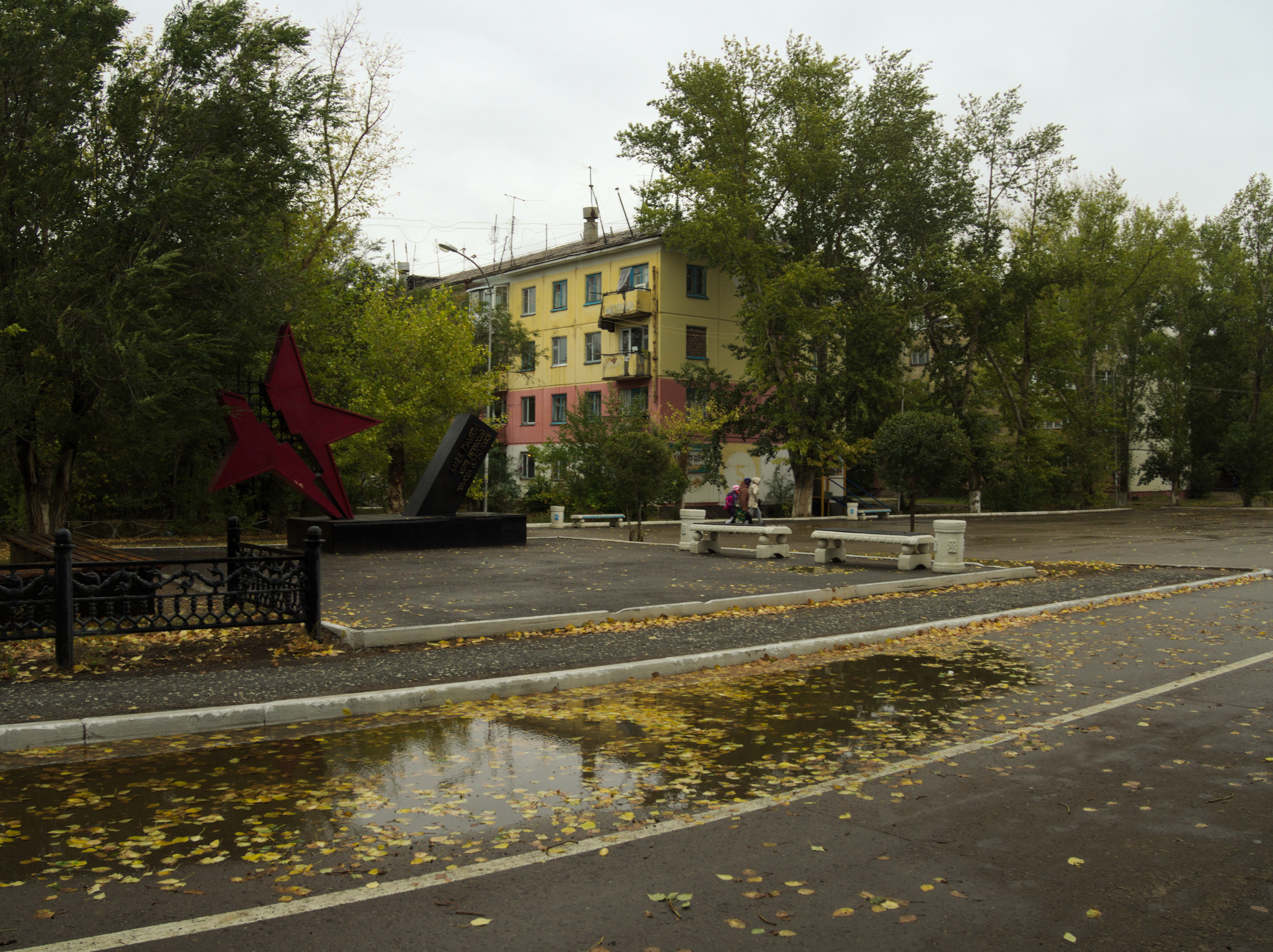 Denkmal an die Opfer der Repression der 1930er- bis 50er-Jahre in Aqmol, Kasachstan